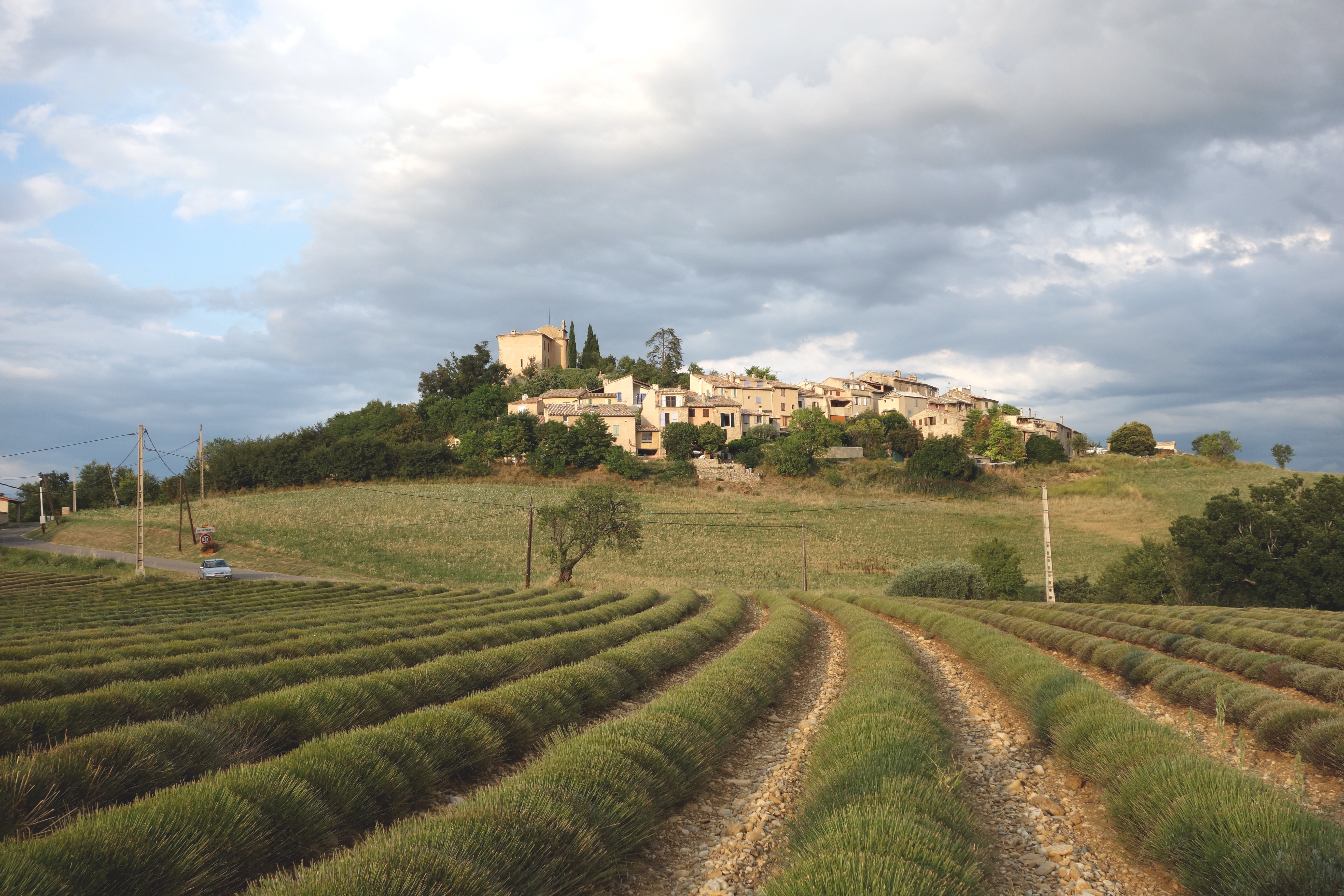 Vue d'ensemble du village avec champ de lavandin au premier plan, après la coupe.